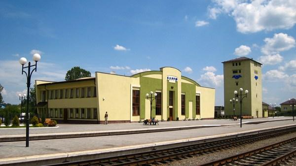 Залізнична станція Калуш